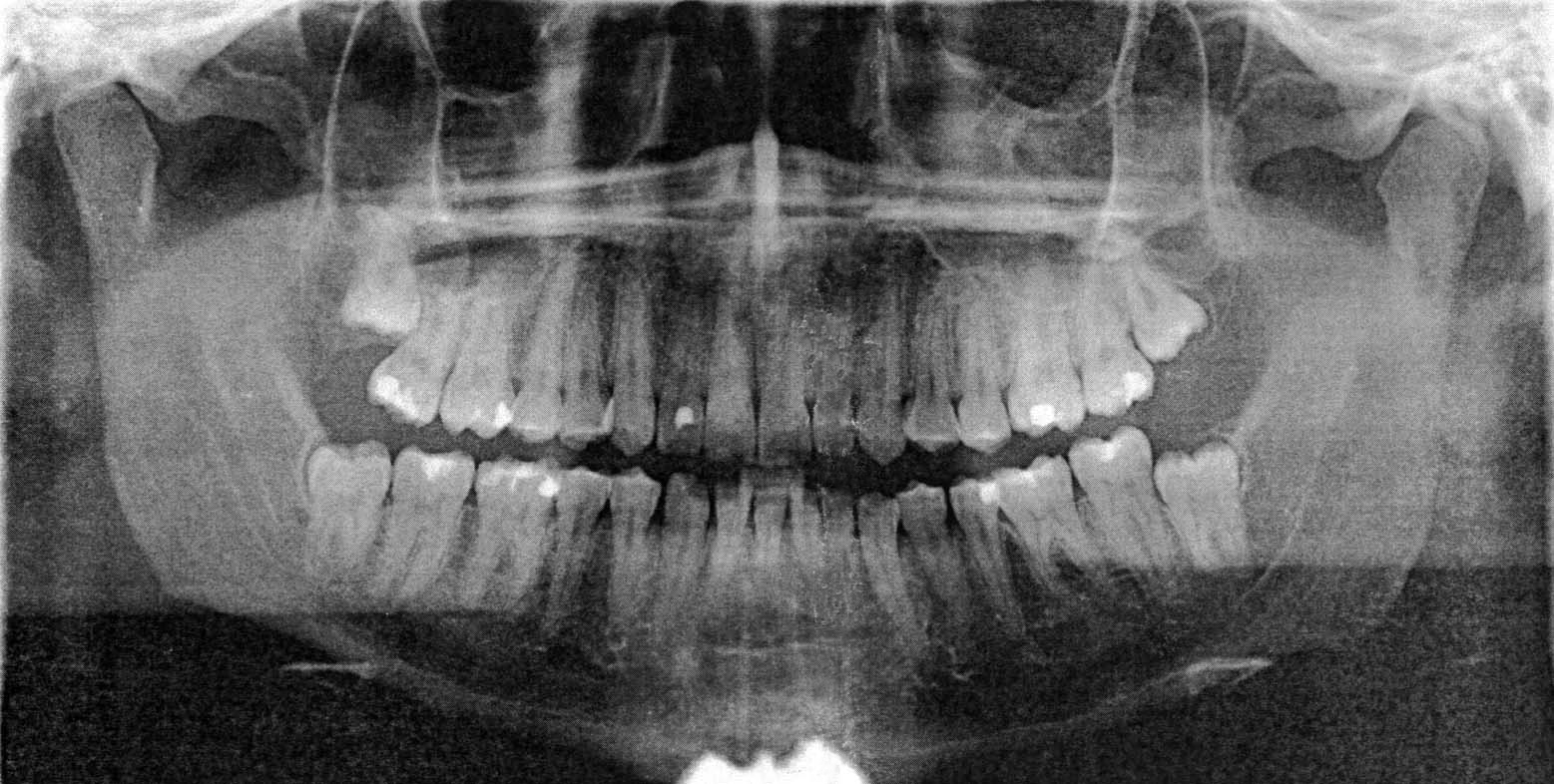 OPG-Aufnahme Befundung: mehrere Füllungen, Weisheitszähne retiniert